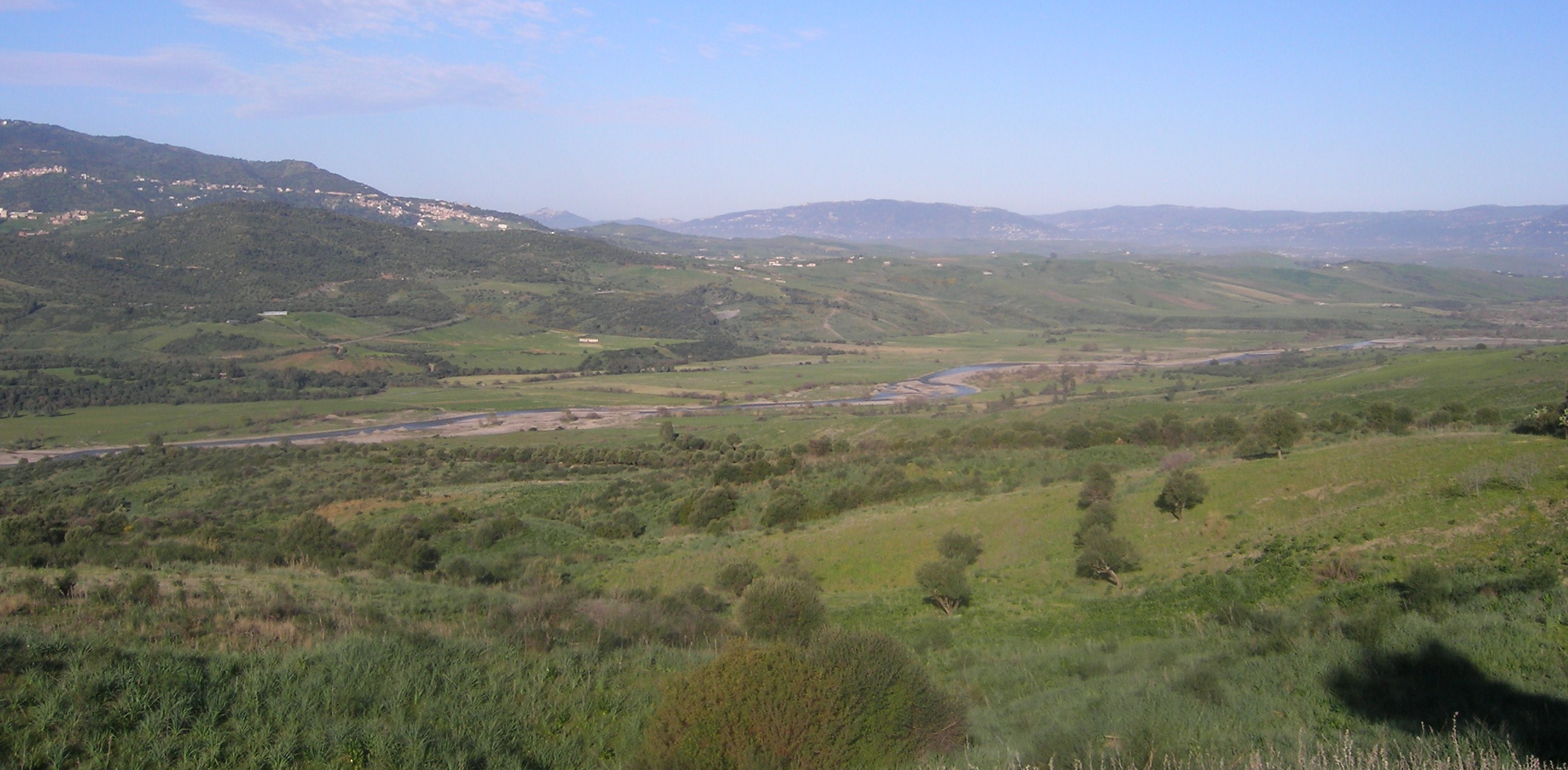 asif asbaw depuis Ifigha